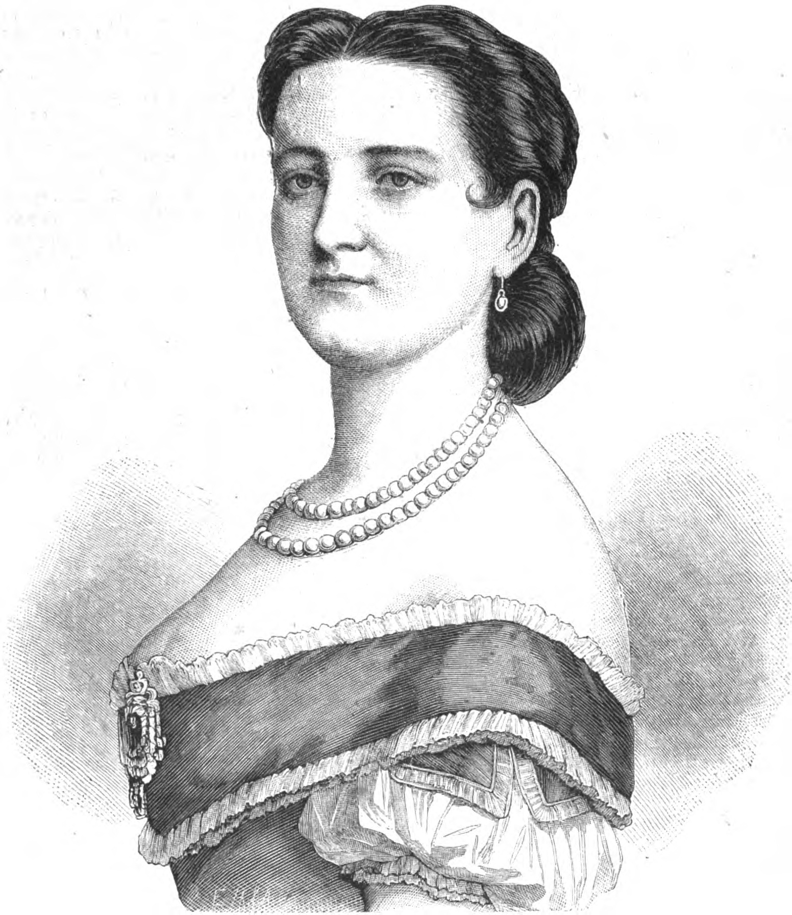 Carlotta Patti, italienische Sängerin im 19. Jh.